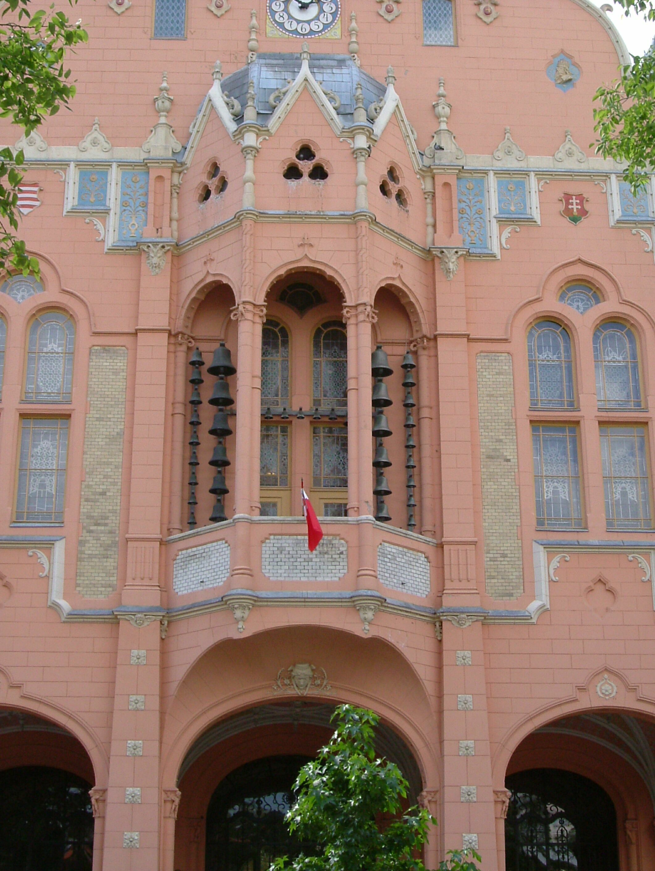 Kecskemét. A városháza harangjátéka